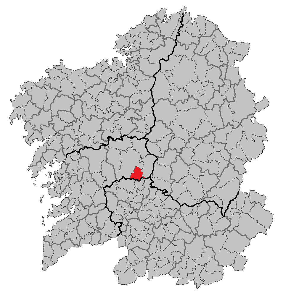 Mapa coa localización do concello de Dozón.